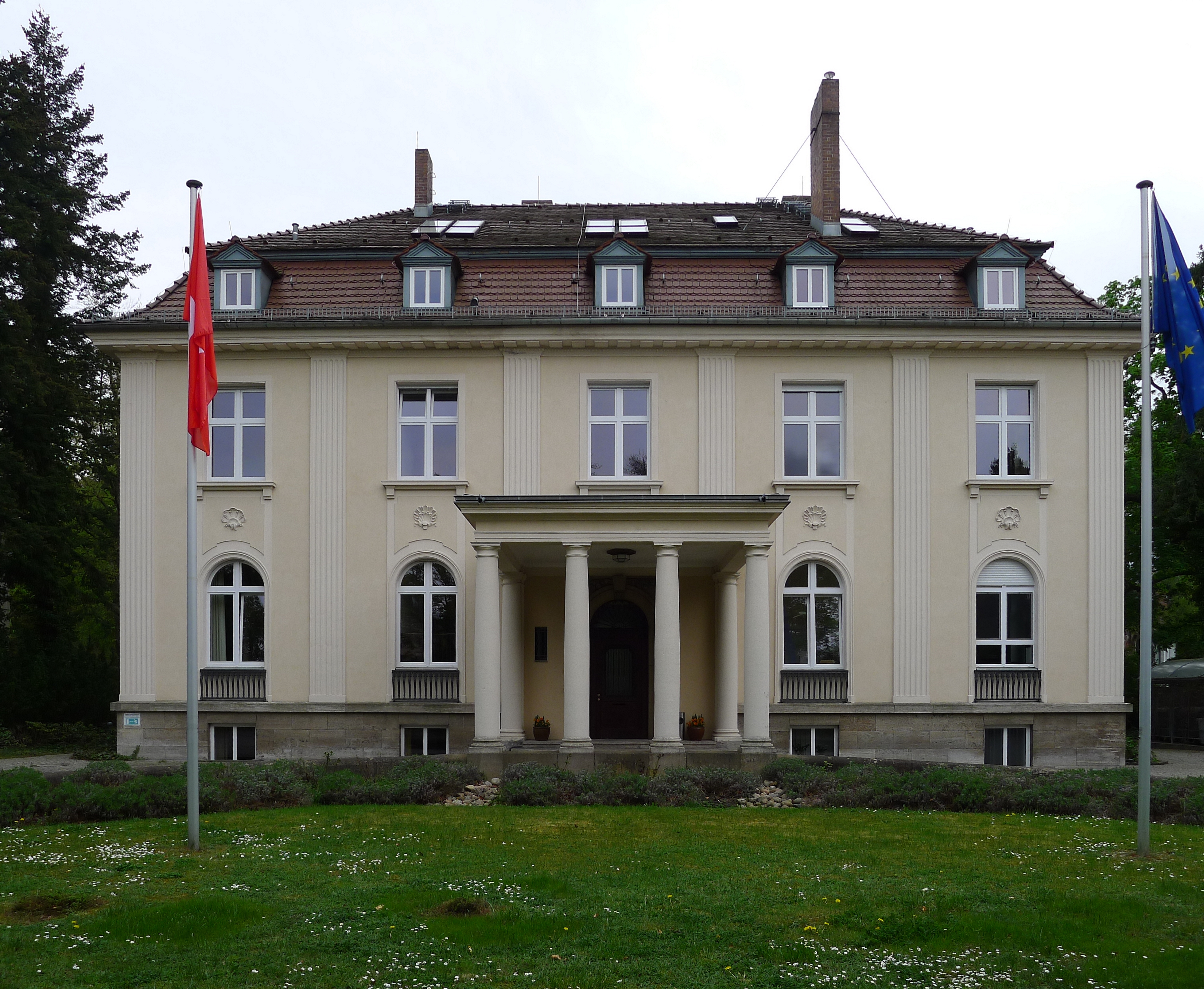 Akademie